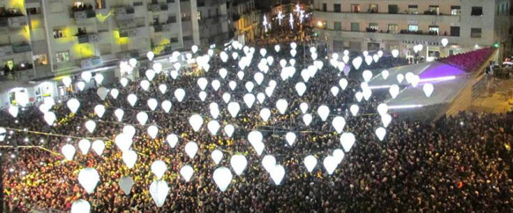 Piazza Bilotti a Cosenza durante il concerto di Capodanno del 31 dicembre 2016.